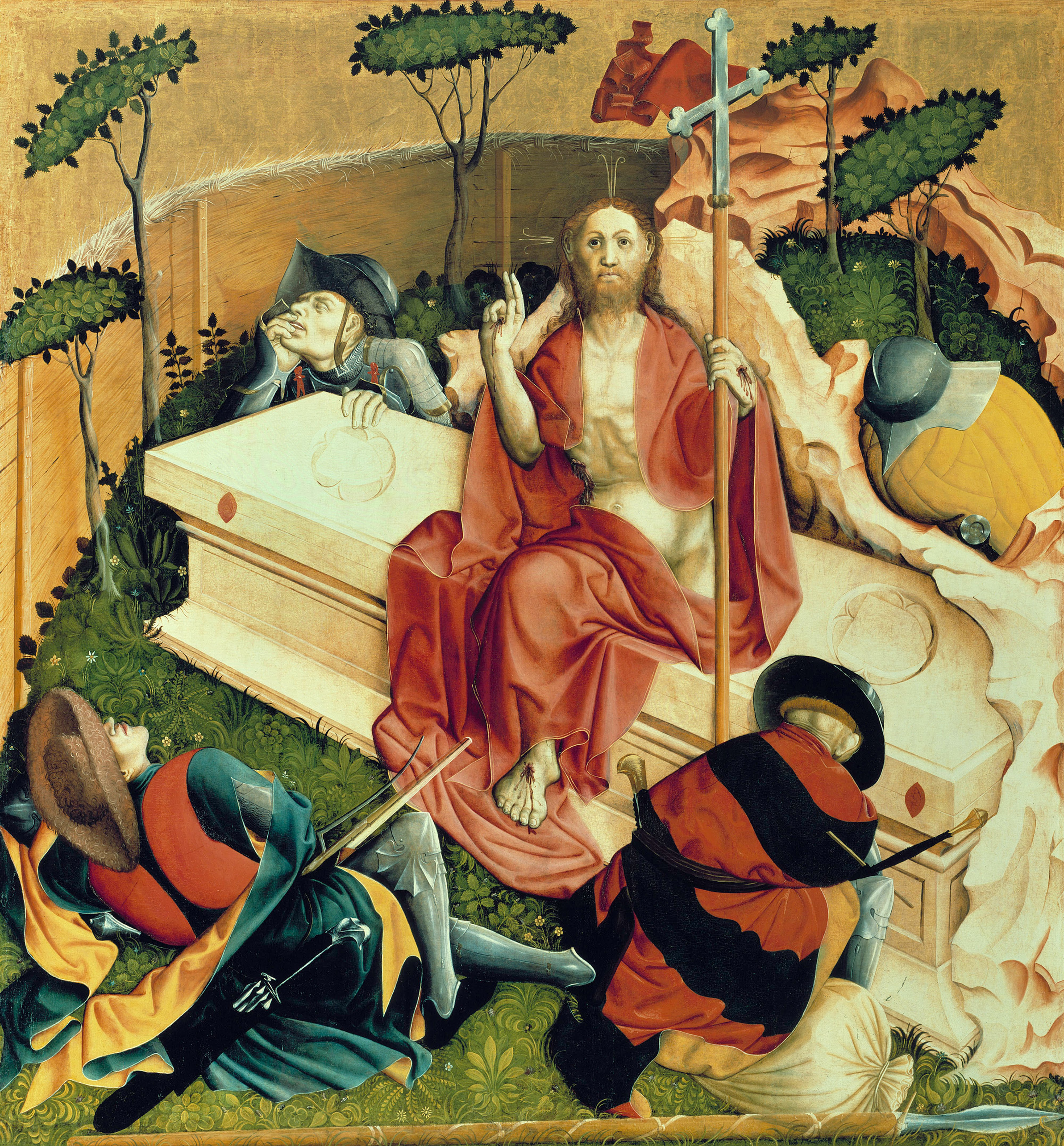 Wurzacher Passionsaltar, left panel inside: bottom right